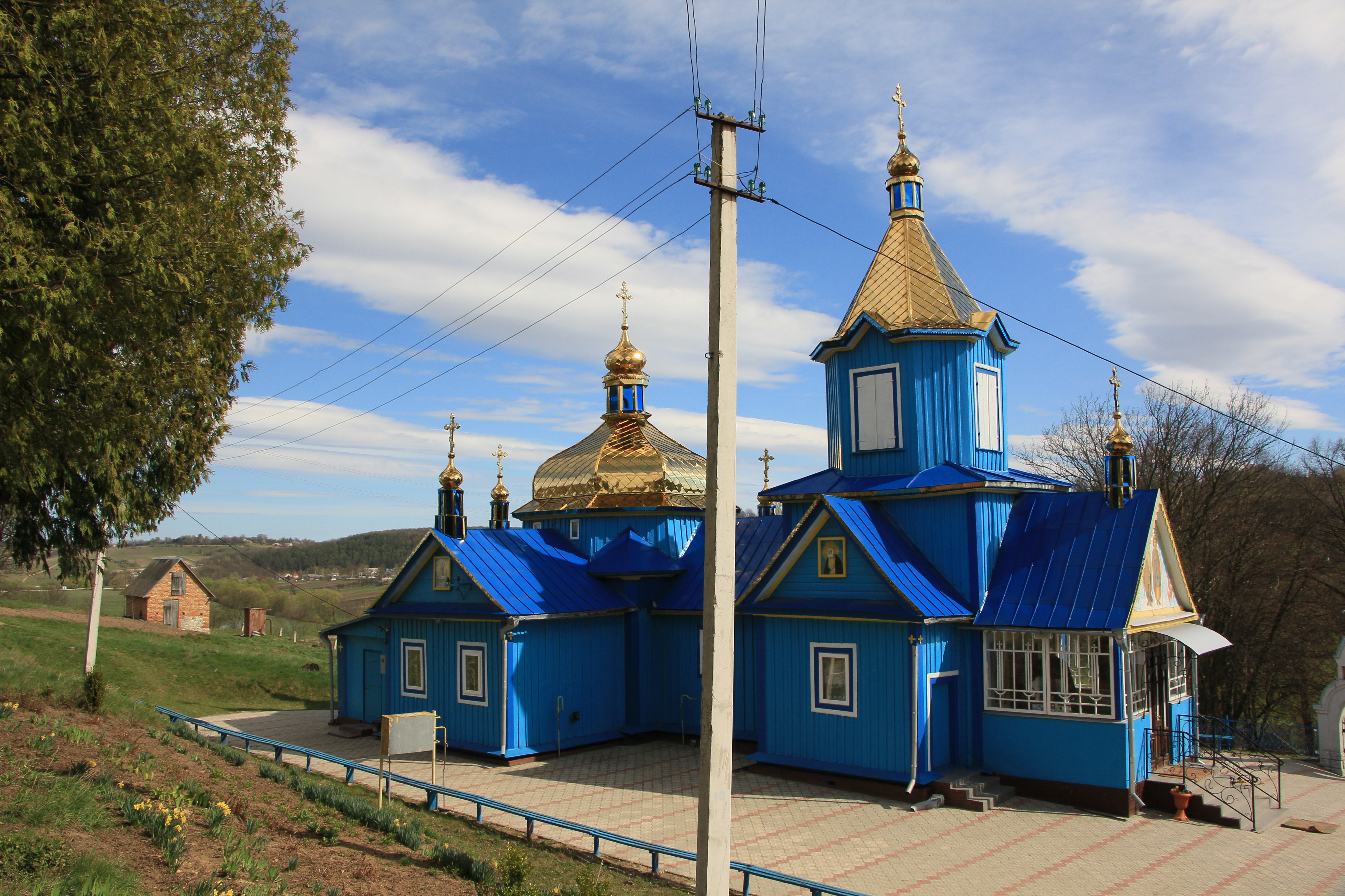 Дерев'яна церква в селі Бутин Збаразького району, Тернопільської області